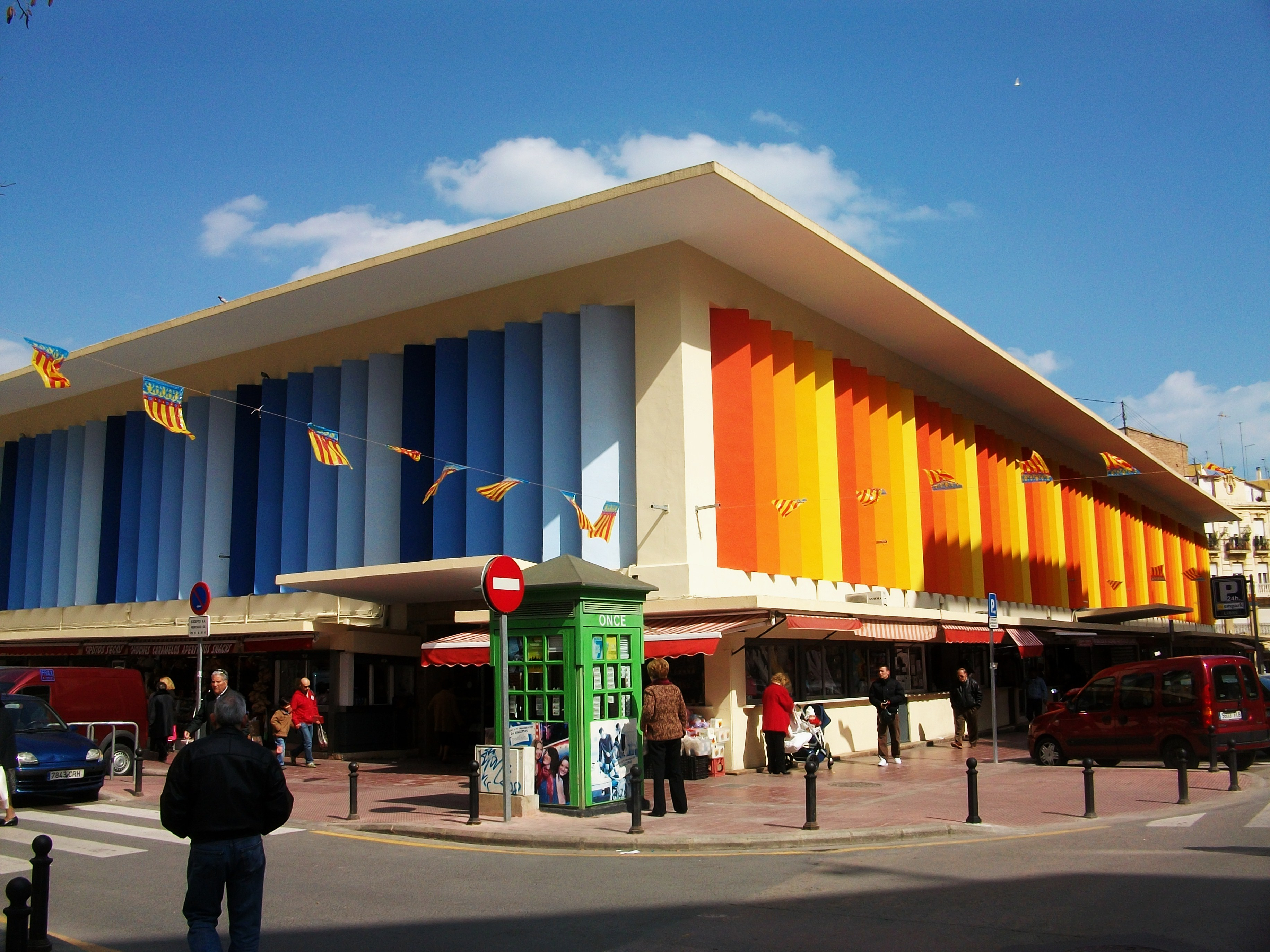 Mercat de Russafa, València.